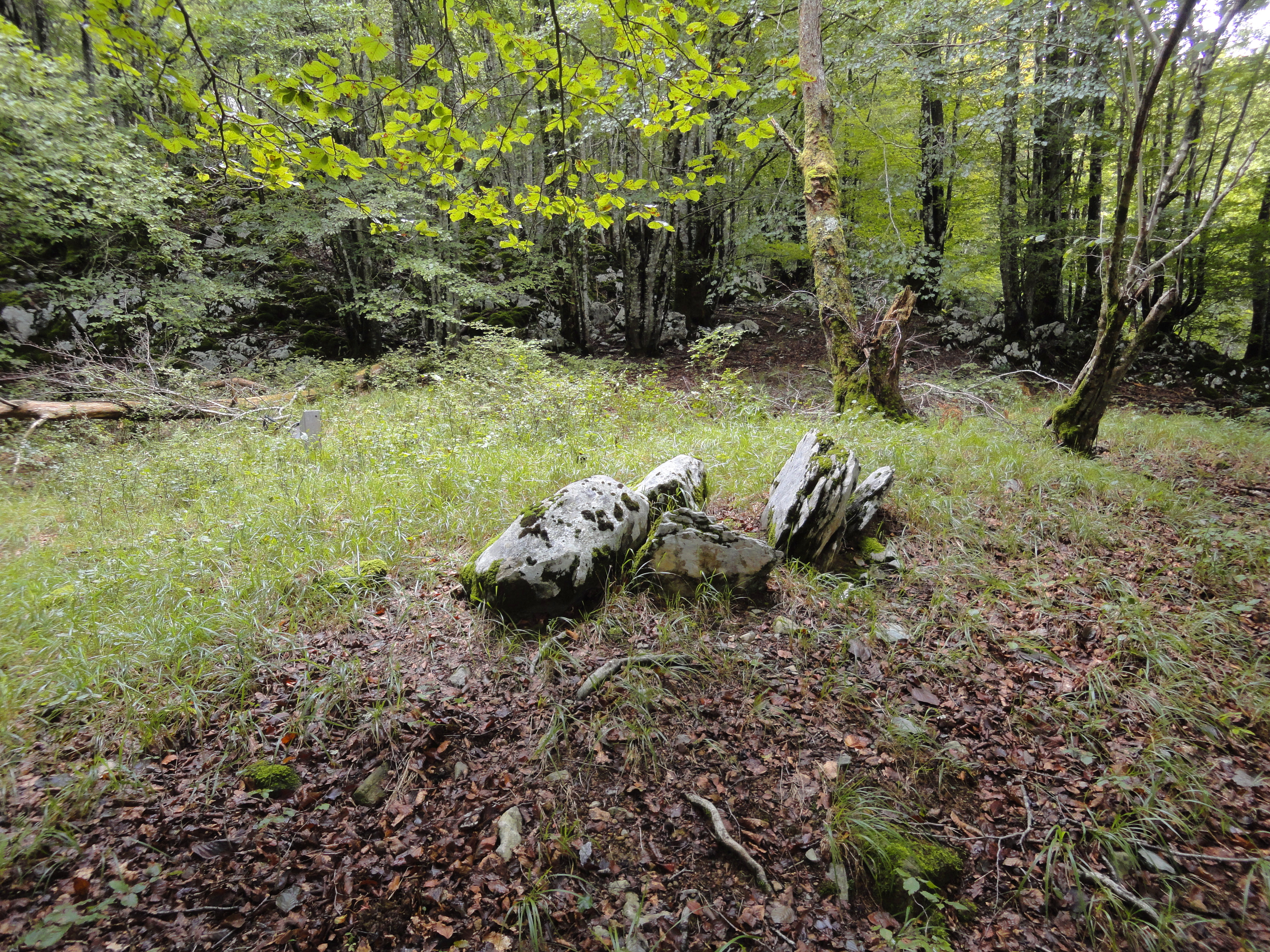 Otsabio trikuharria - Altzo